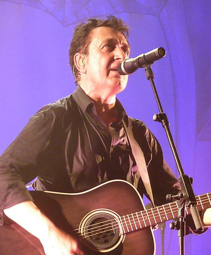 Concierto en Barcelona, mayo del 2012.